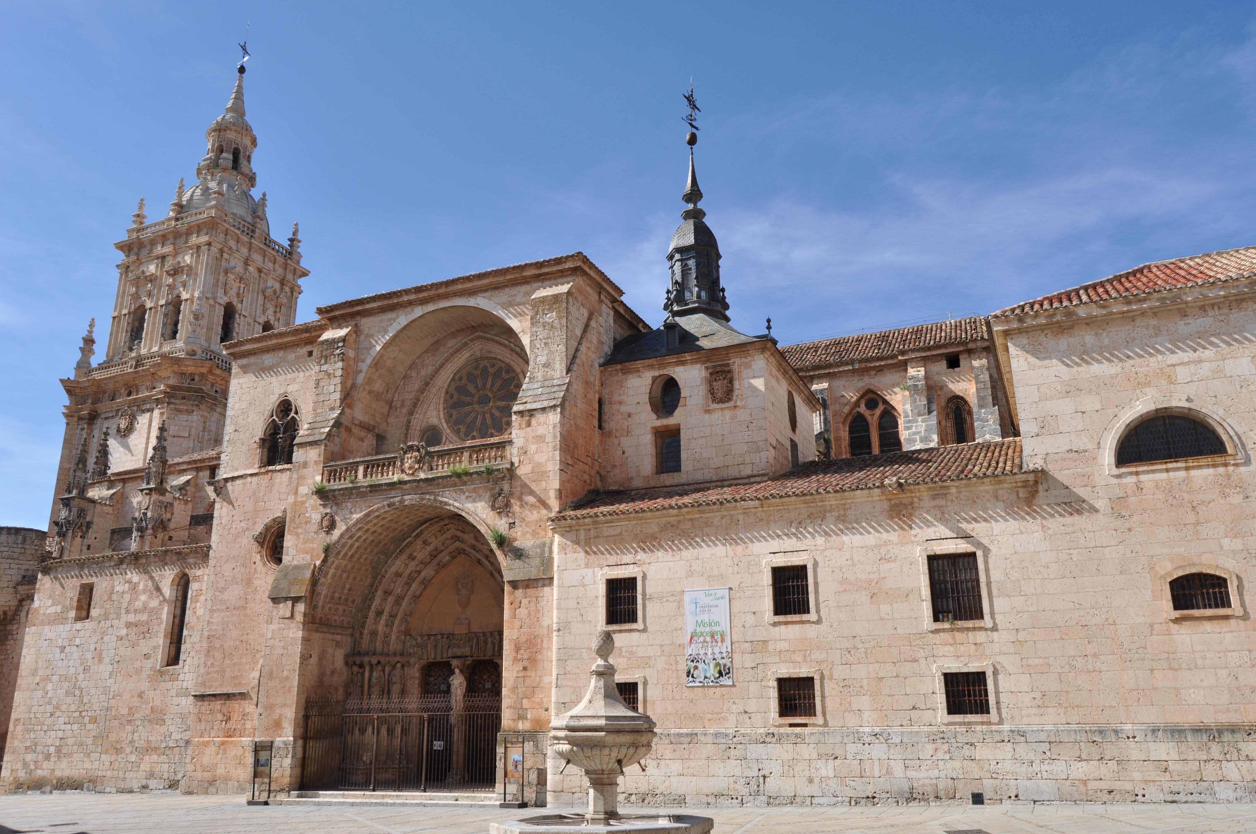 El Burgo de Osma - 019